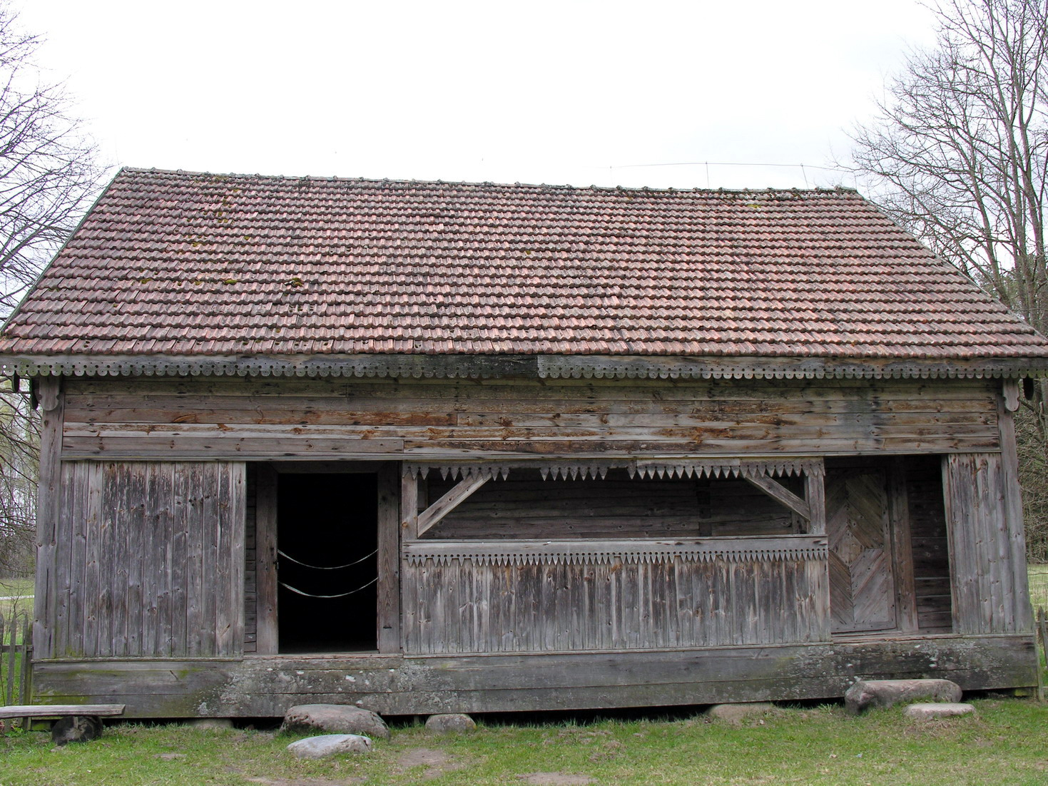 Suvalkiečių svirnas 2007 m. balandžio 21 d., Lietuva